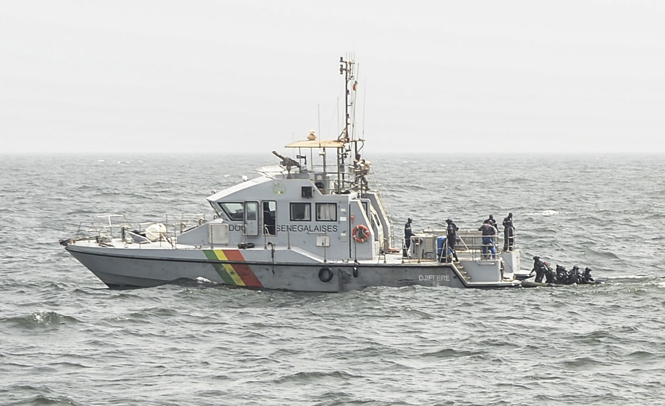 Le Djiffere, RPB 20 de la douane sénégalaise.